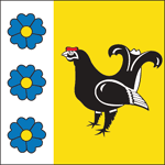 Прапор Старовижівського району